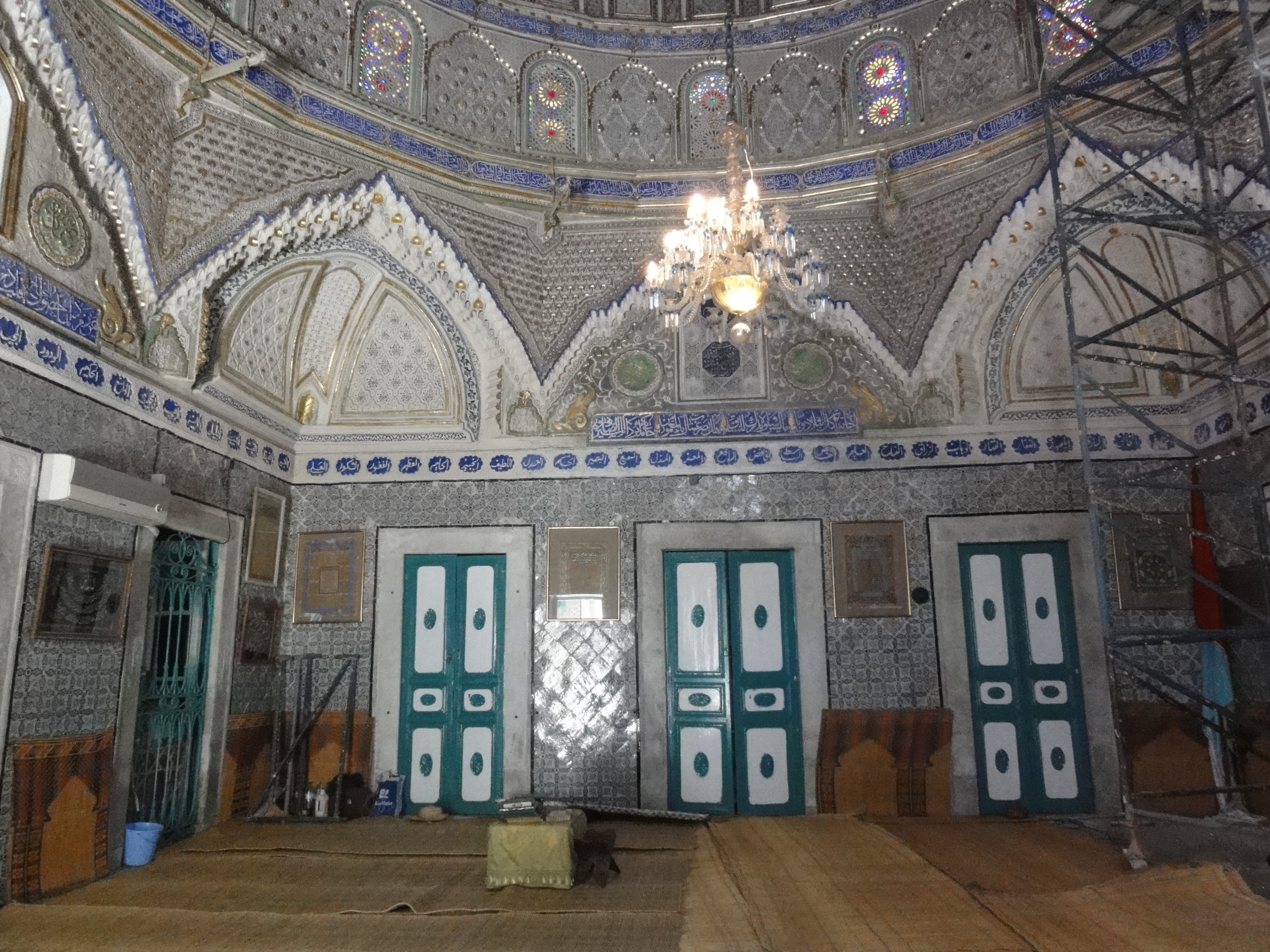 Intérieur de la zaouïa de Sidi Brahim Riahi (médina de Tunis) et son travail du stuc